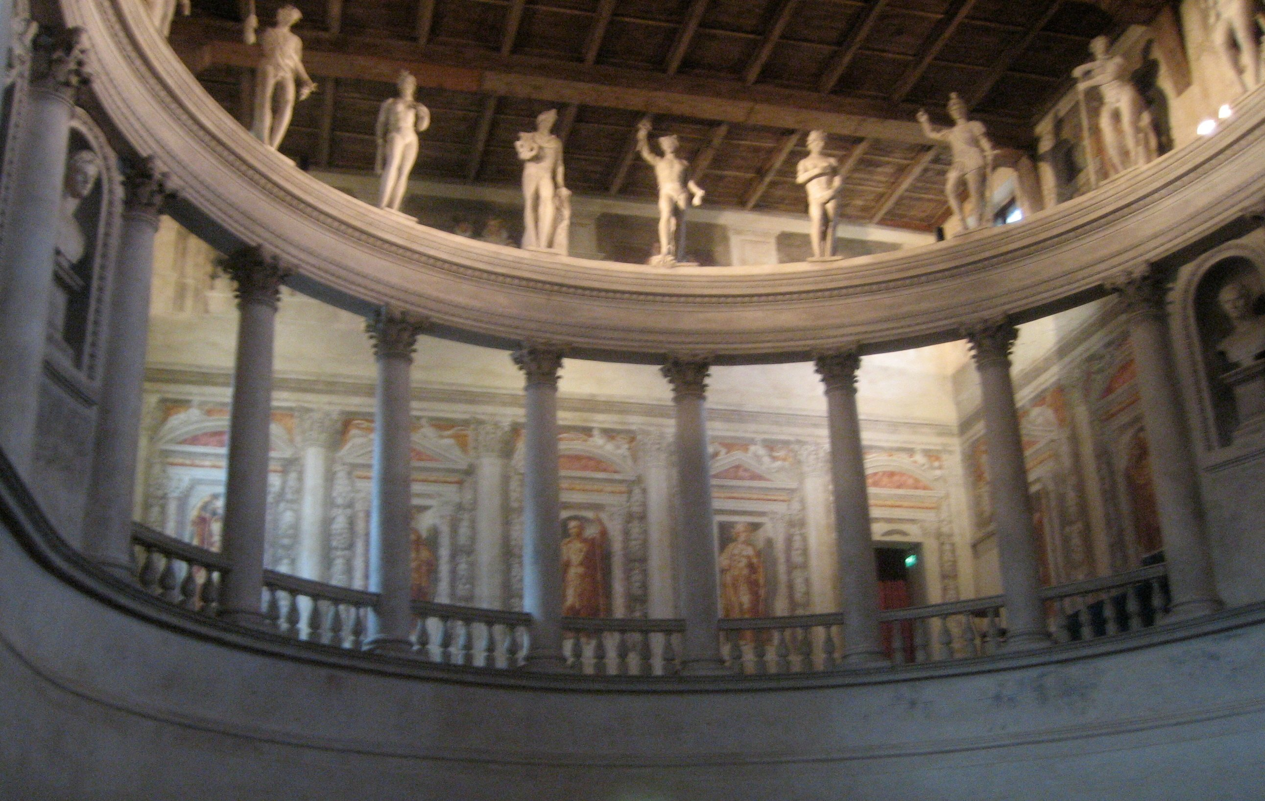 Teatro Säulengalerie